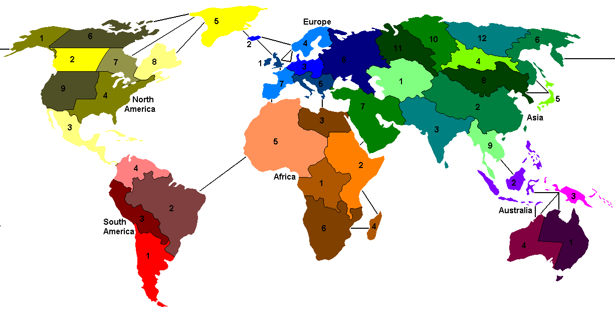 Risk map in Wikipedia.